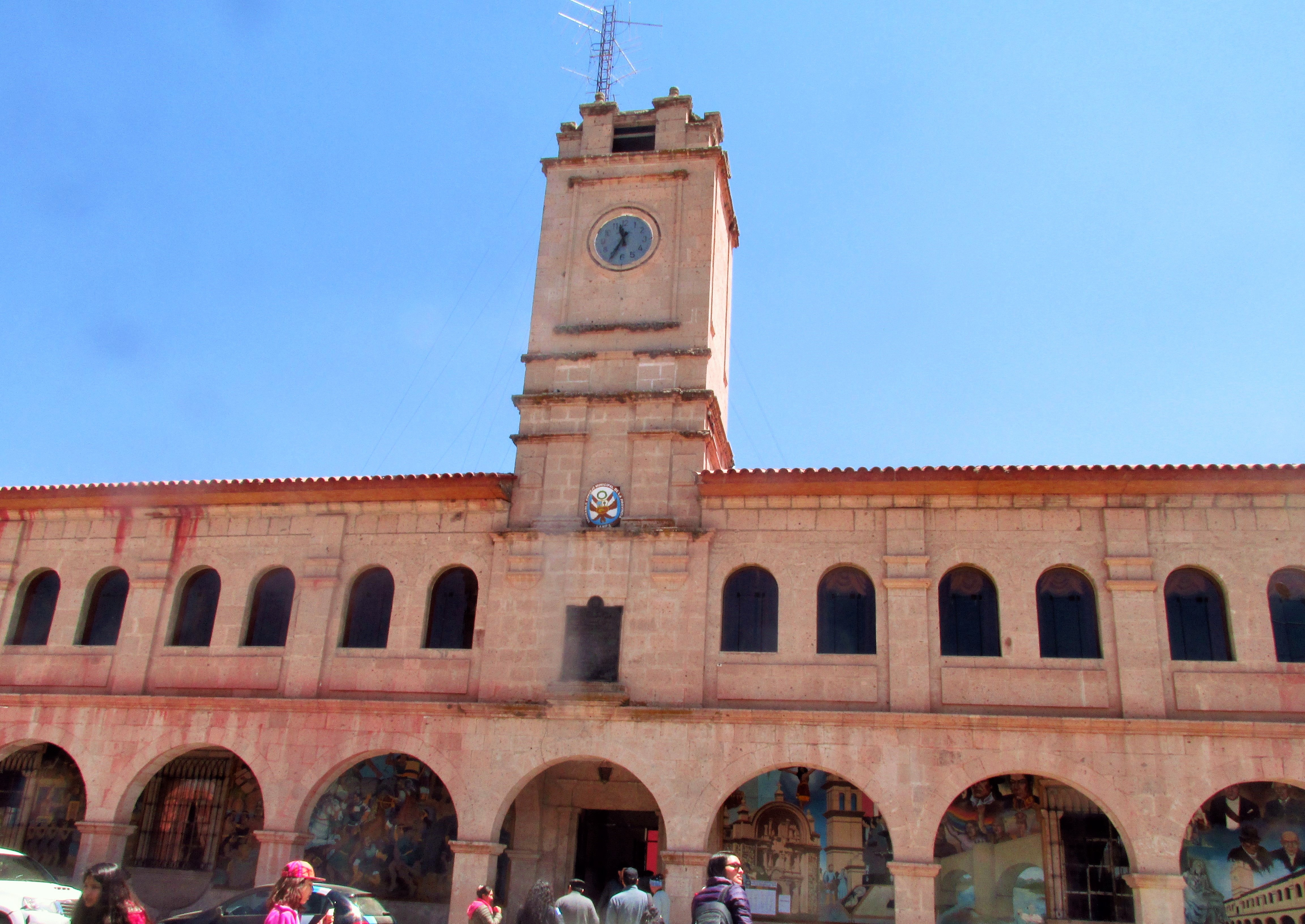 Acceso principal a la Municipalida de Lampa desde la Plaza de Armas de Lampa.